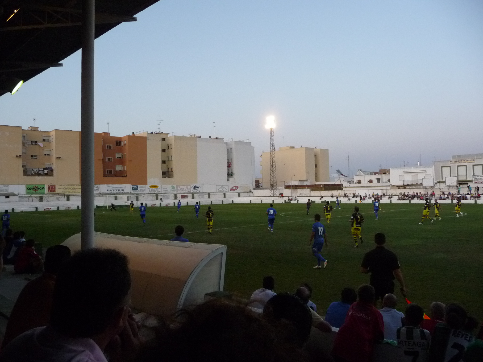 Estadio-PuertoReal-XerezCD-p1040389.jpg